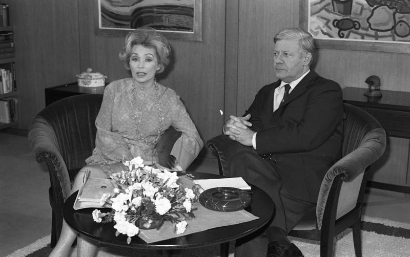 Fernsehinterview des Bundeskanzlers mit Lilli Palmer